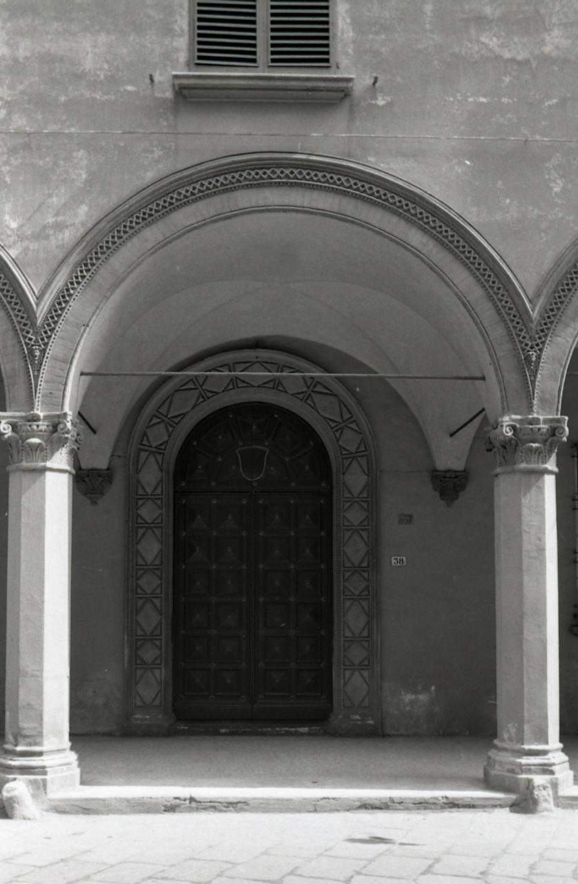 Servizio fotografico : Bologna, 1969 / Paolo Monti. - Strisce: 7, Fotogrammi complessivi: 38 : Negativo b/n, gelatina bromuro d'argento/ pellicola ; 35 mm. - ((I fotogrammi hanno una doppia numerazione. . - Sul portanegativi: Nikon FP3. - Occasione: Campagna di rilevamento del centro storico del comune di Bologna. - Fonte: Fattura di Paolo Monti: IV. Commesse/ Fattura (1969/05/09), presso Archivio Paolo Monti. - Fonte: Fattura di Paolo Monti: IV. Commesse/ Fattura (1969/07/31), presso Archivio Paolo Monti. - Fonte: Agenda di Paolo Monti: Monti - Agenda 1969 (1969), presso Archivio Paolo Monti